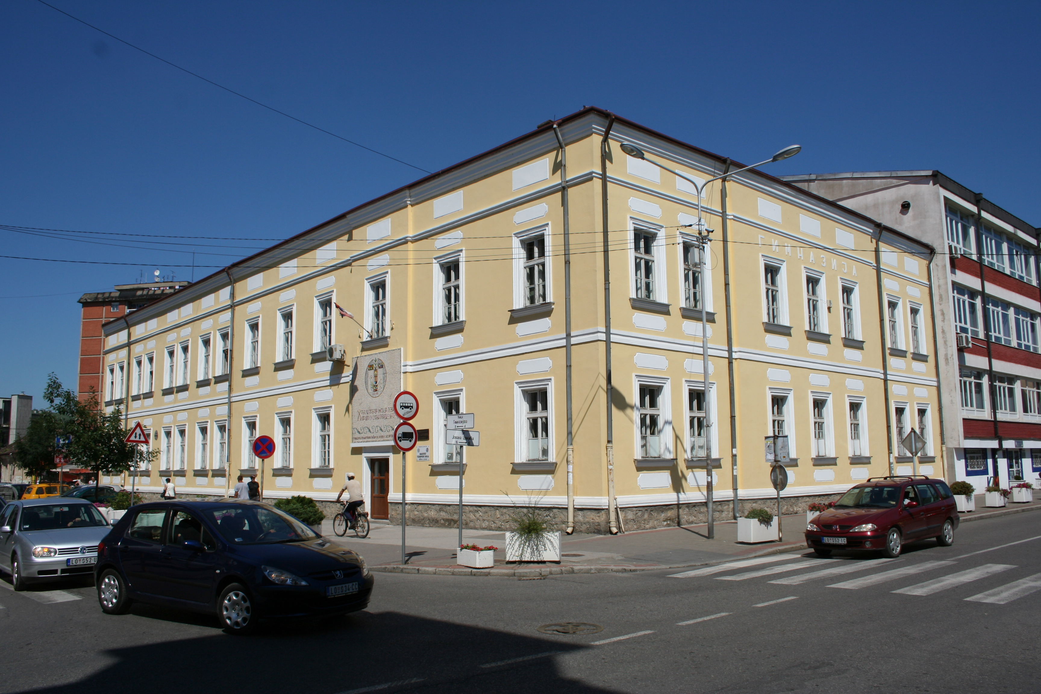 Gimnazija "Vuk Karadžić" Loznica